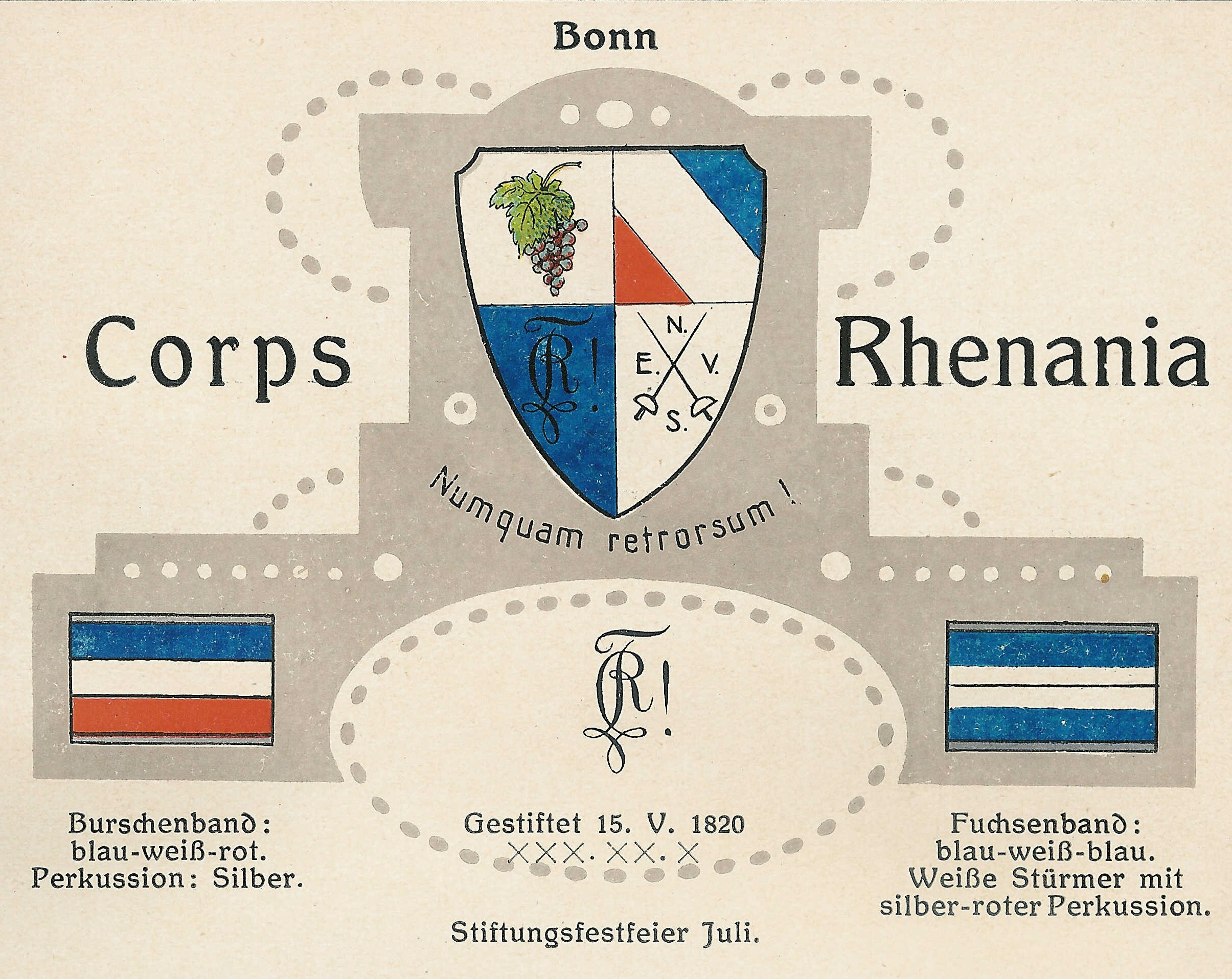 Wappen, Zirkel, Couleur und Corpshaus der Arminia München